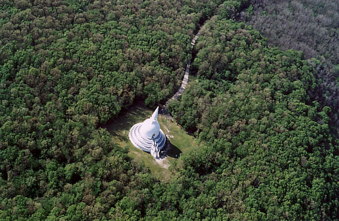 zalaszántó - Sztúpa, Hungary, aerialphotography